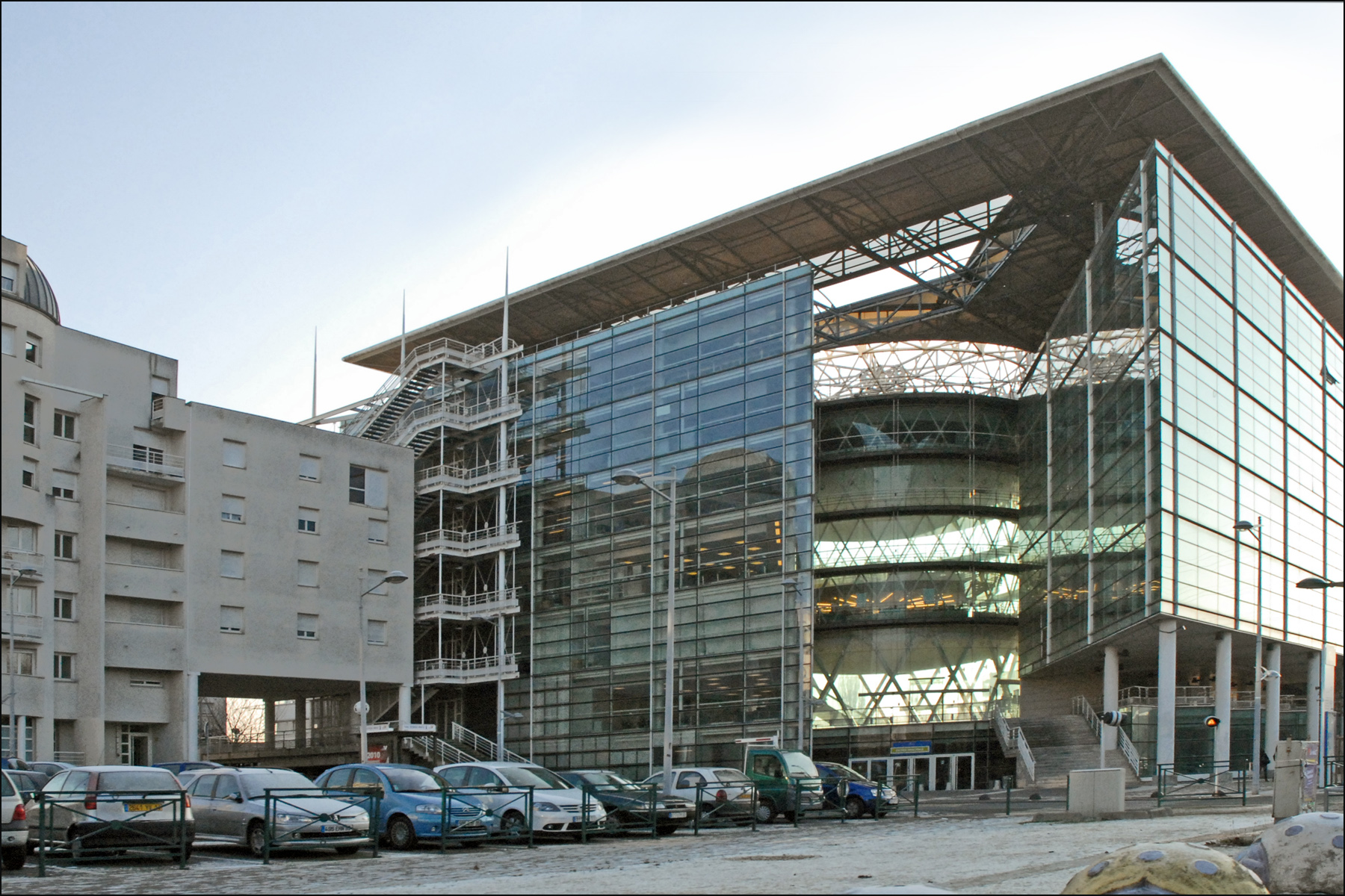 Le site de Saint-Martin de l'université de Cergy-Pontoise : - UFR sciences et techniques - IPAG (Institut de Préparation à l’Administration Générale)